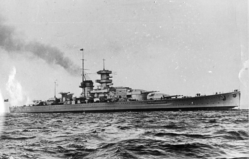 Schlachtschiff "Gneisenau" Schlachtschiff "Gneisenau" vor den Umbauarbeiten Anfang 1939 (noch ohne "Atlantikbug")